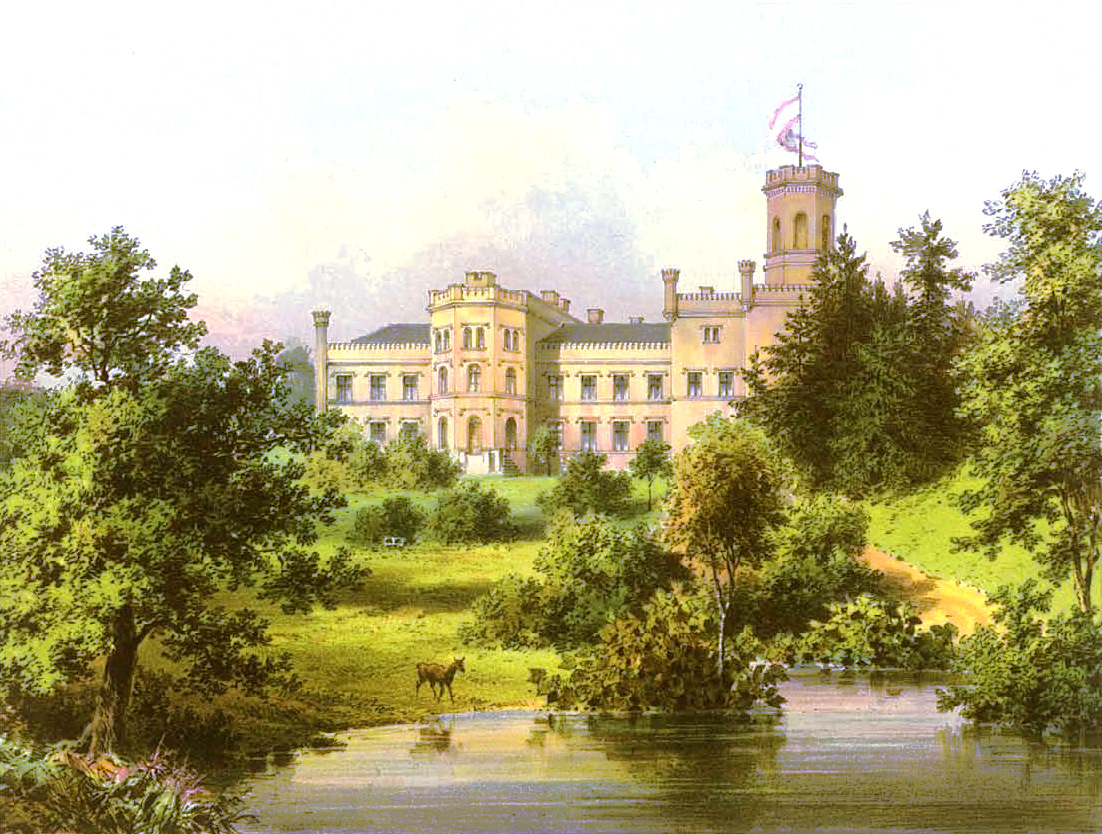 Schloss Merenthin, Kreis Friedeberg, Provinz Brandenburg